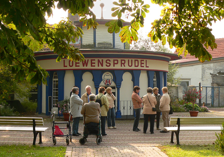 Brunnentempel Bad Zwesten, Oktober 2008